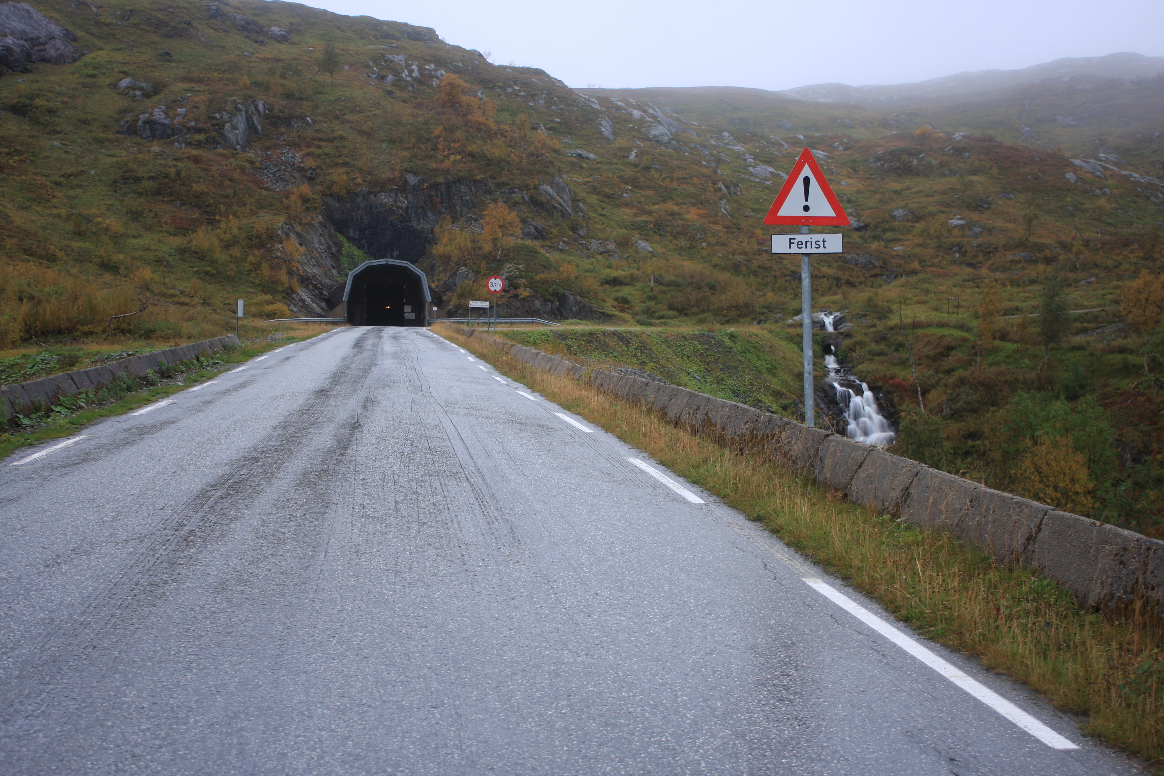 Norsk (bokmål): Steinfjelltunnelen